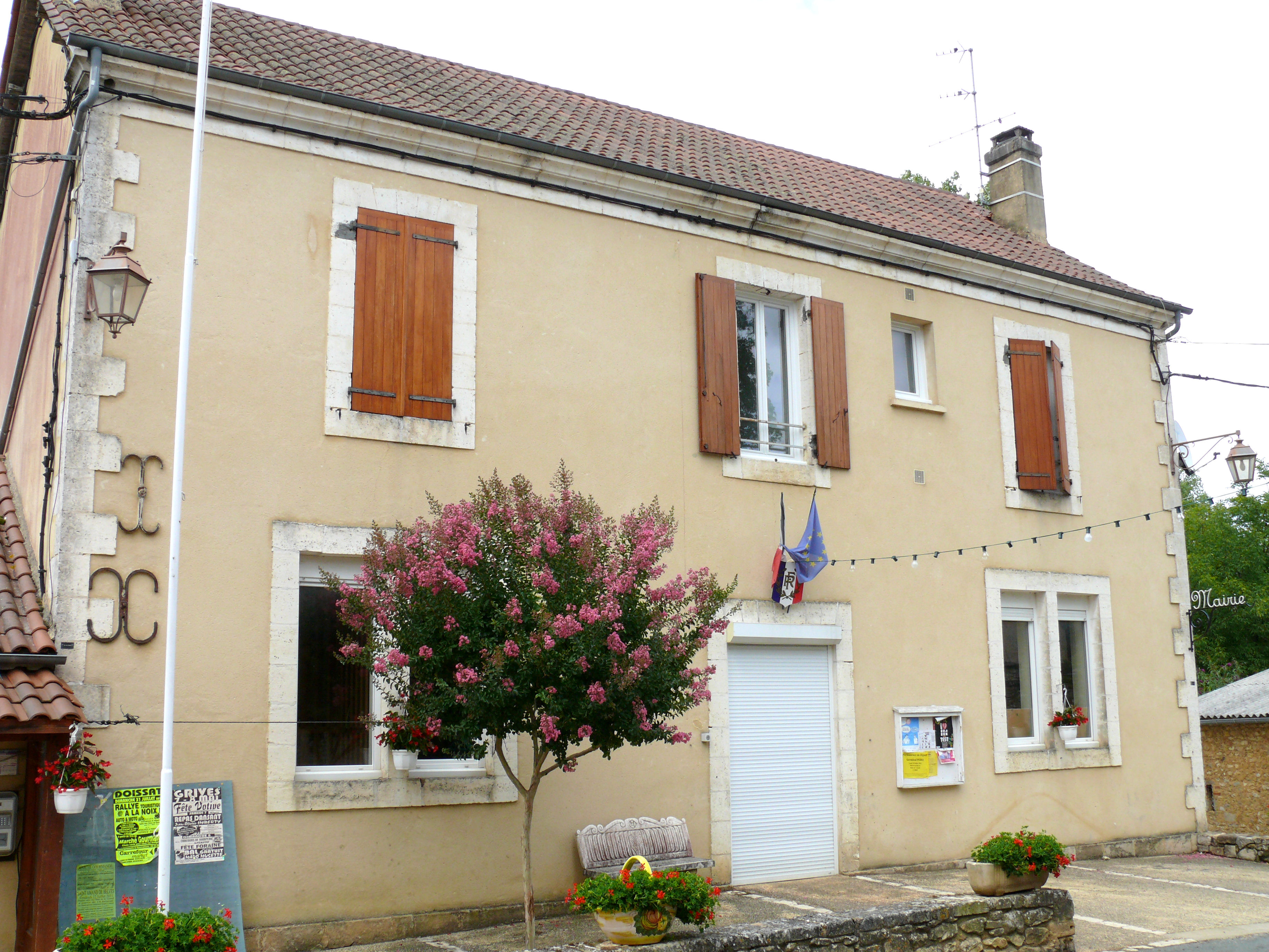 Doissat - Mairie